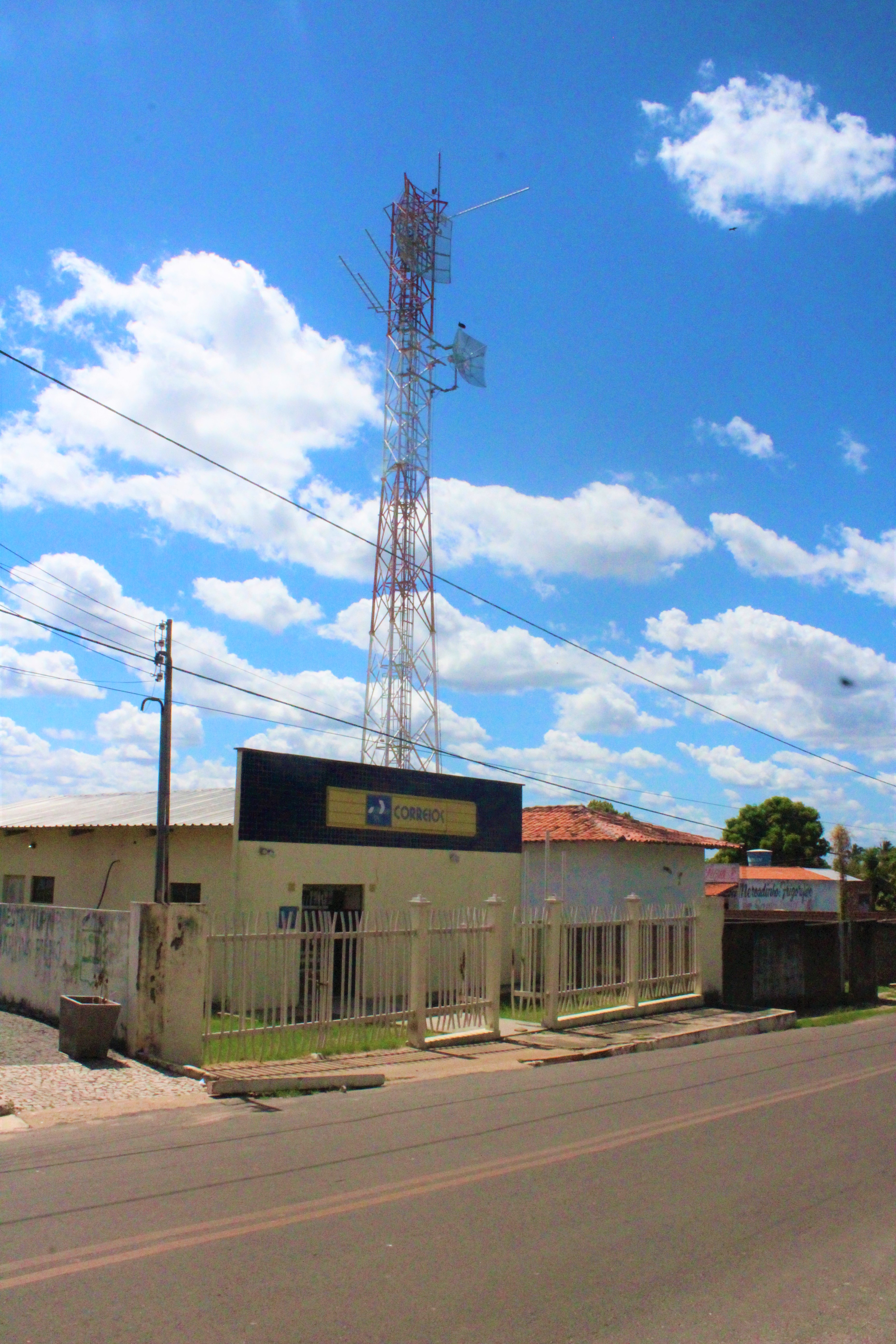 Agência dos Correios em Coivaras, Piauí.